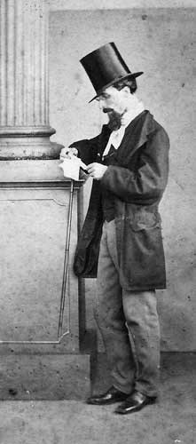 Vincenzo Cabianca, photo